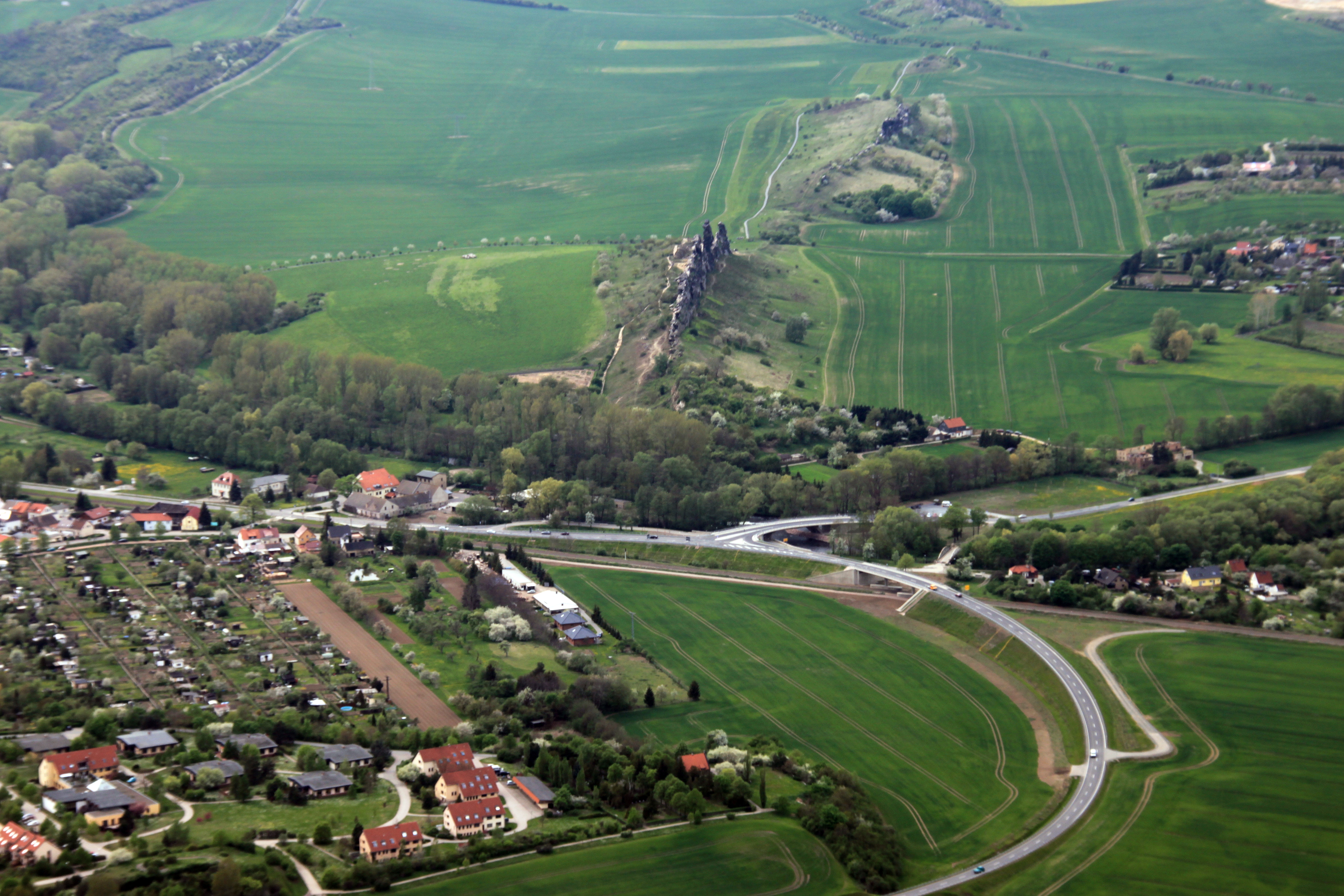 Teufelsmauer bei Neinstedt. Im Vordergrund der Osterberg der Neinstedter Anstalten, die Bode (mittig) sowie die davorliegende Bahnstrecke Magdeburg–Thale, im Hintergrund rechts der Anfang von Weddersleben